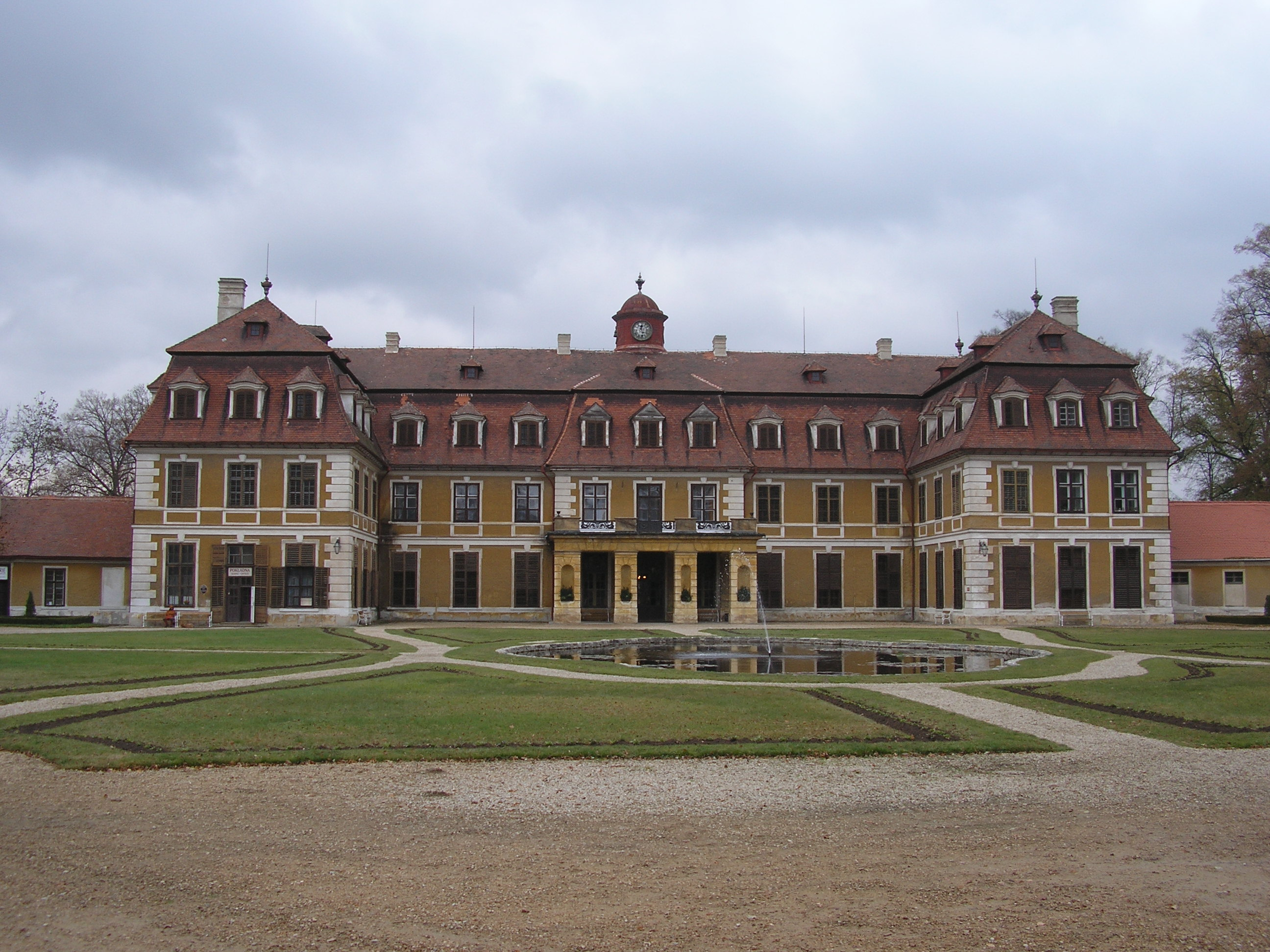 Zámek Rájec-Jestřebí